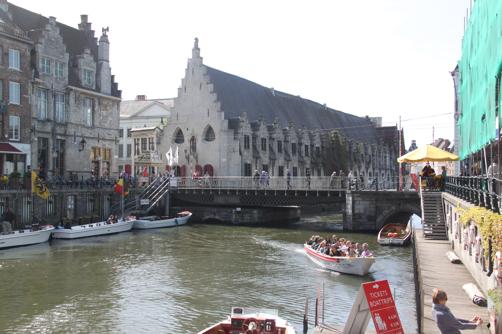 Ghent, Belgium on 2011-04-10